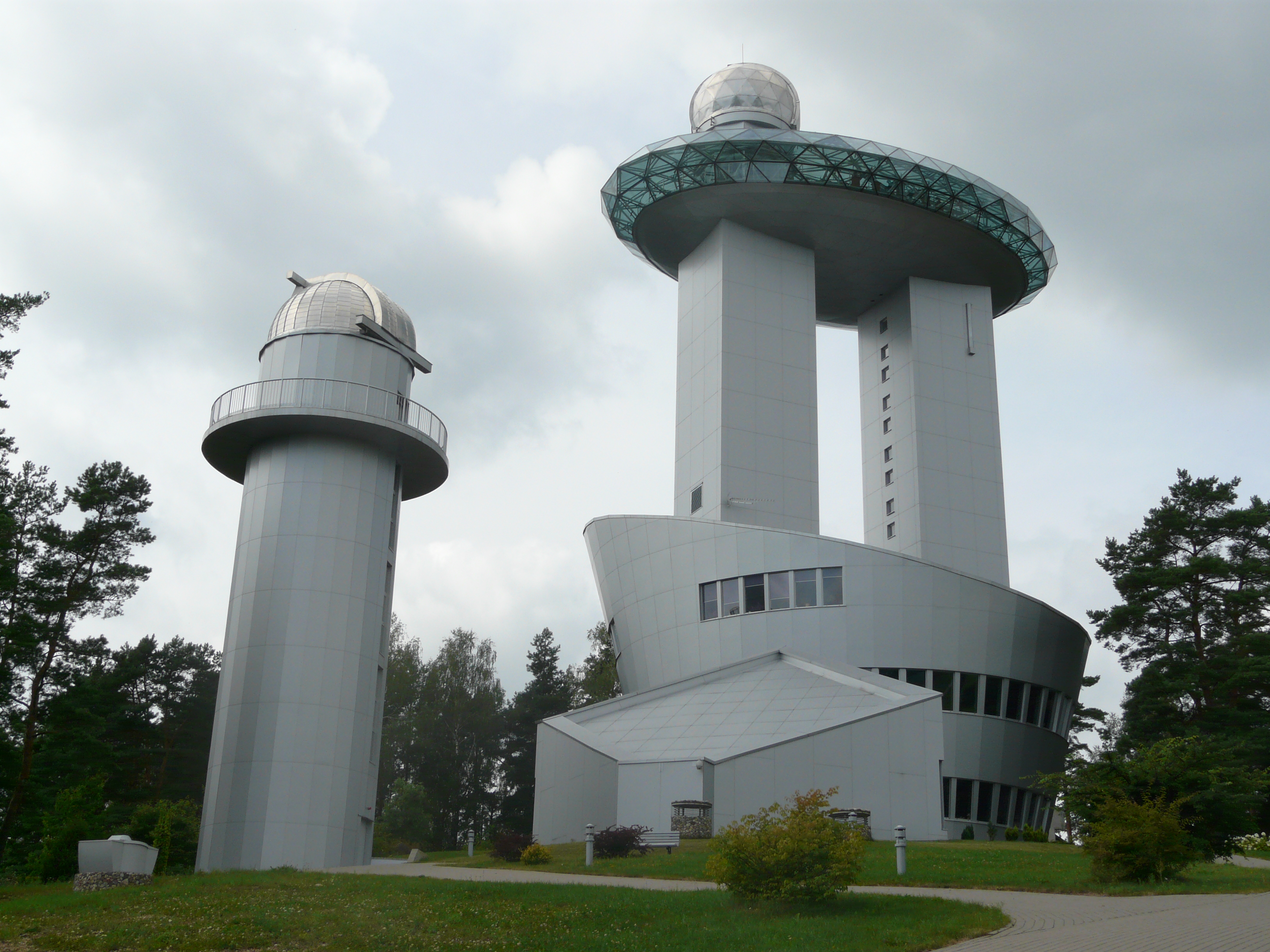 Molėtų observatorija